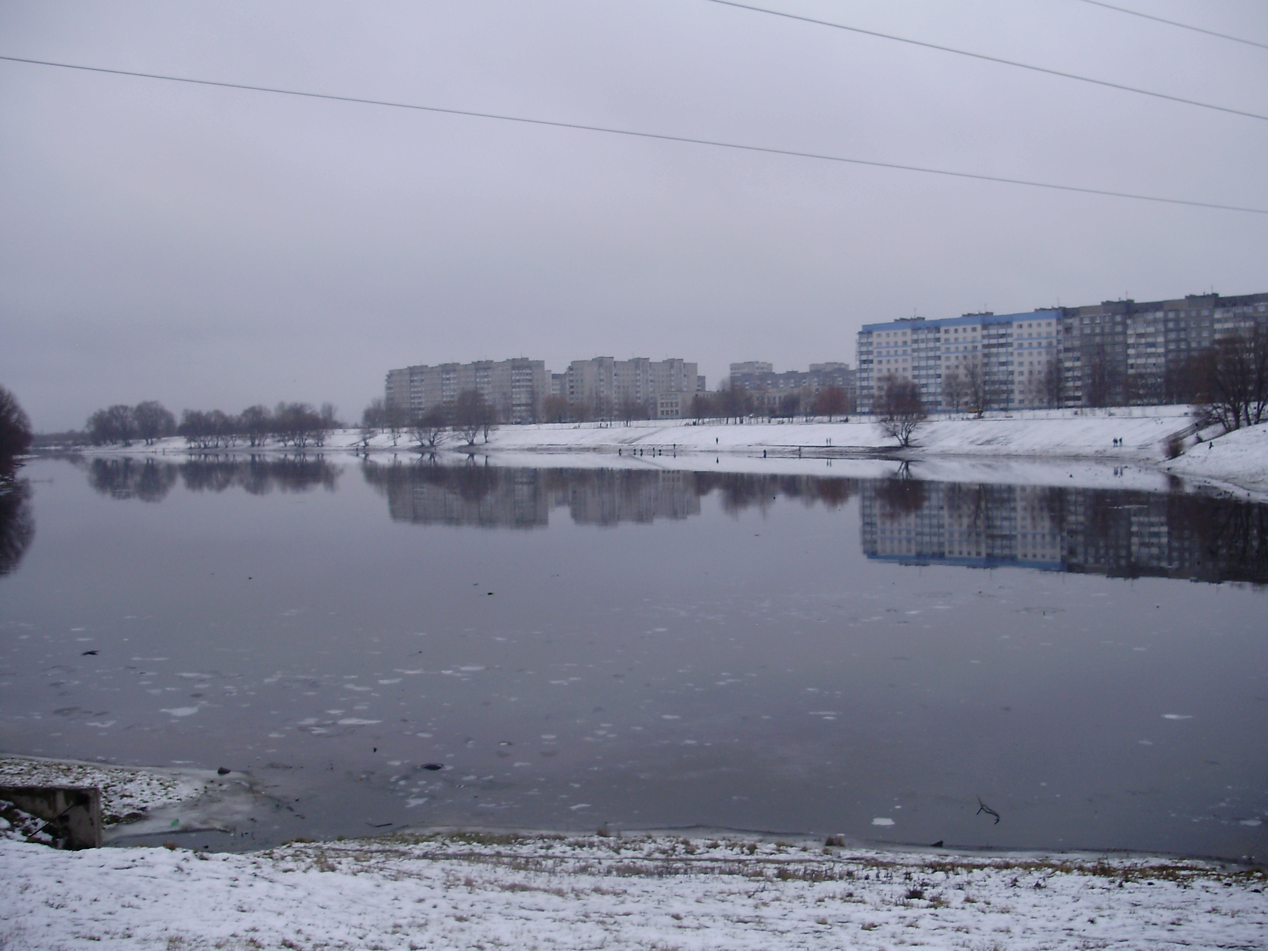 г. Гомель, 5-й микрорайон